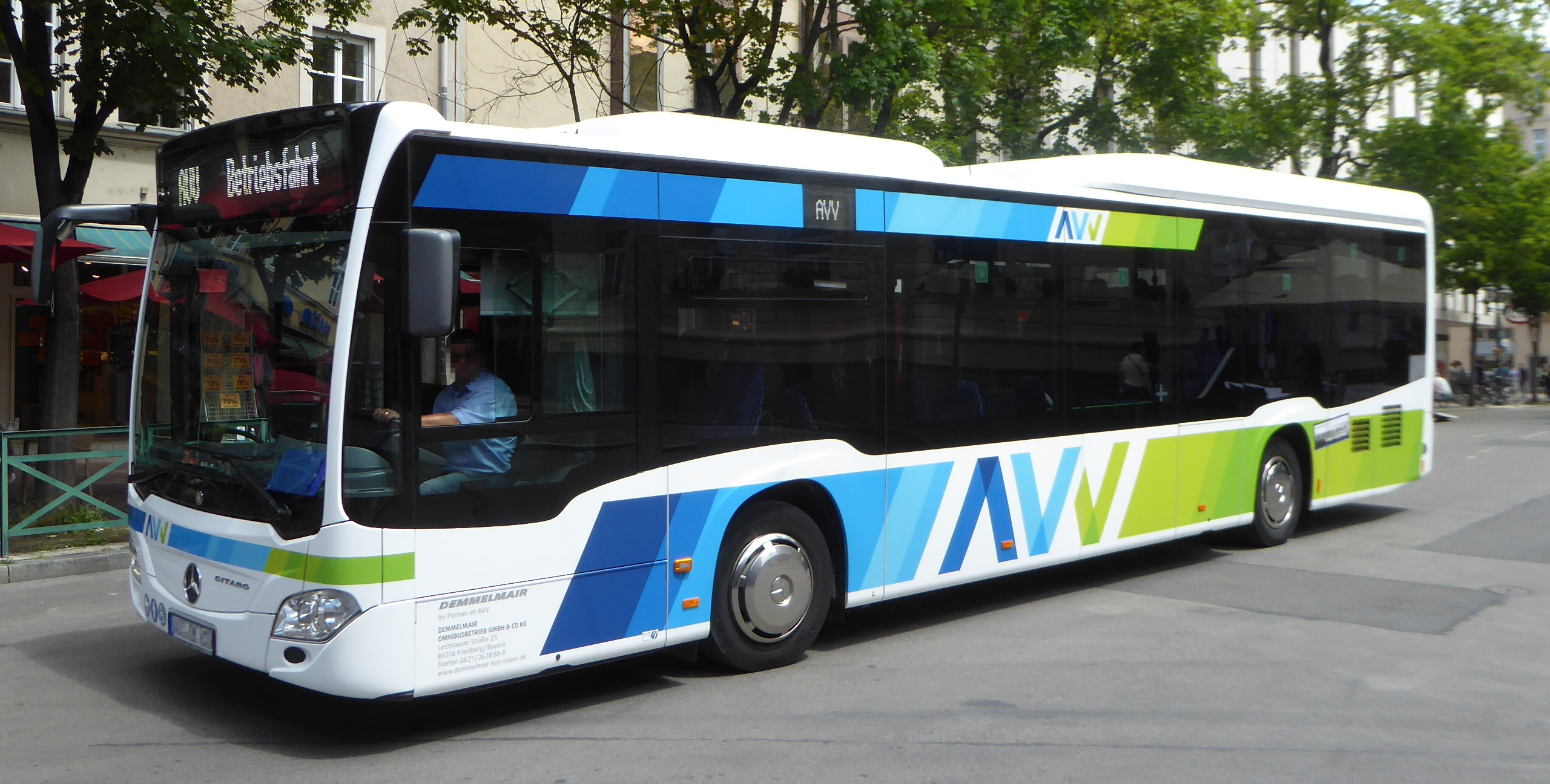 Augsburg, AVV-Bus auf Betriebsfahrt am Hauptbahhof.